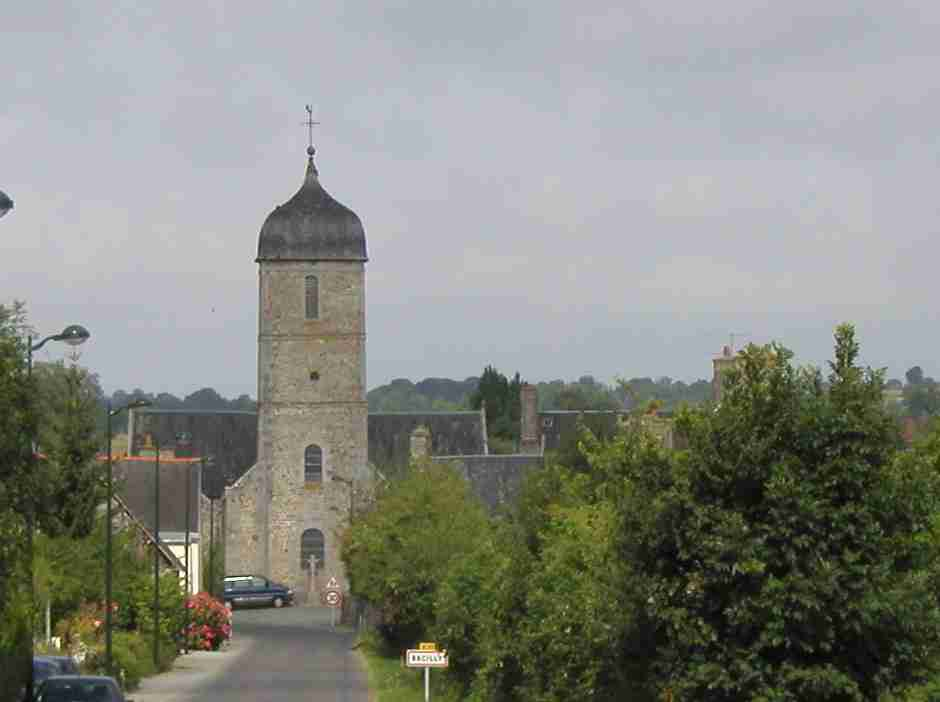 Bacilly (Manche, Basse-Normandie), Frankreich.